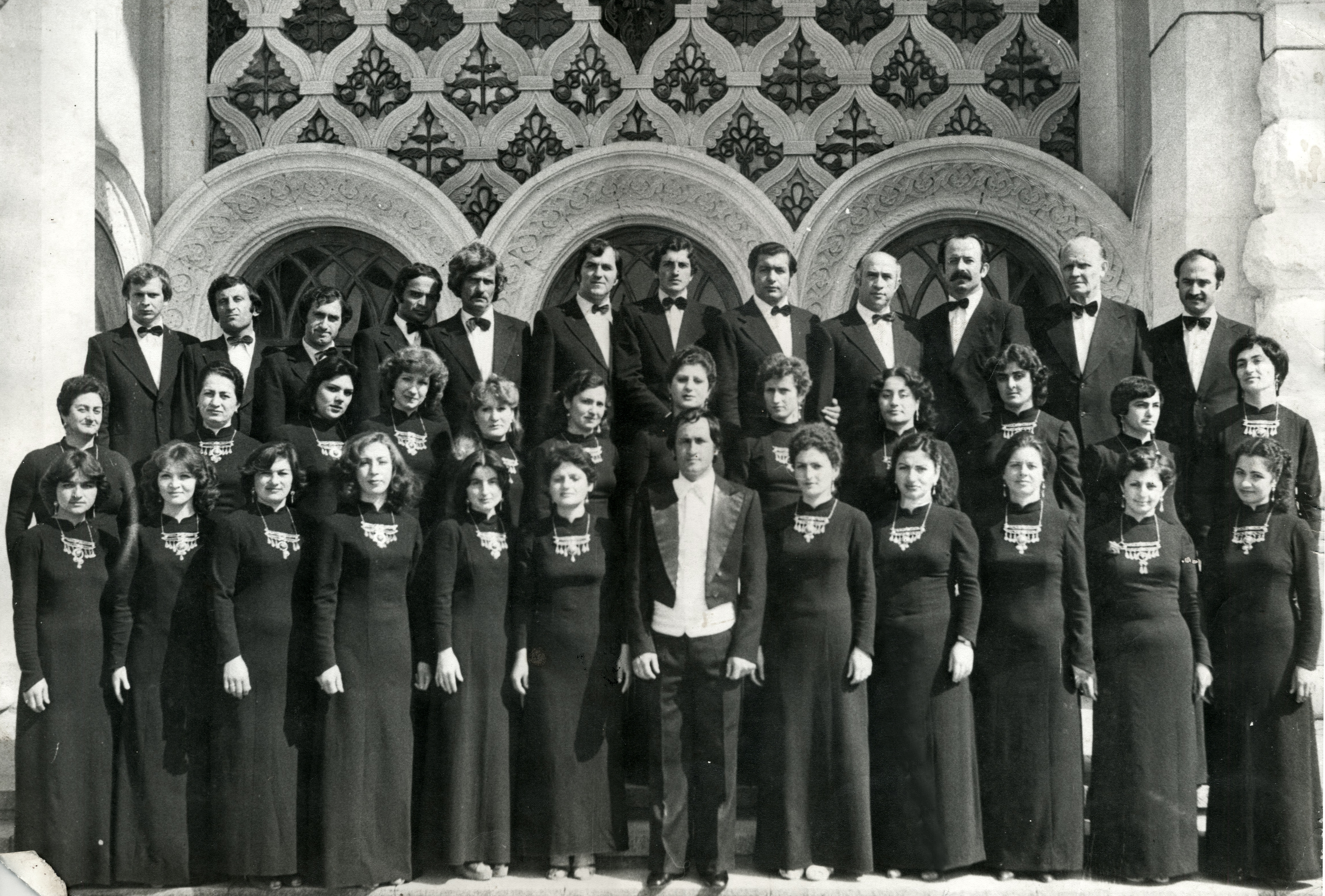 с коллективом до концерта